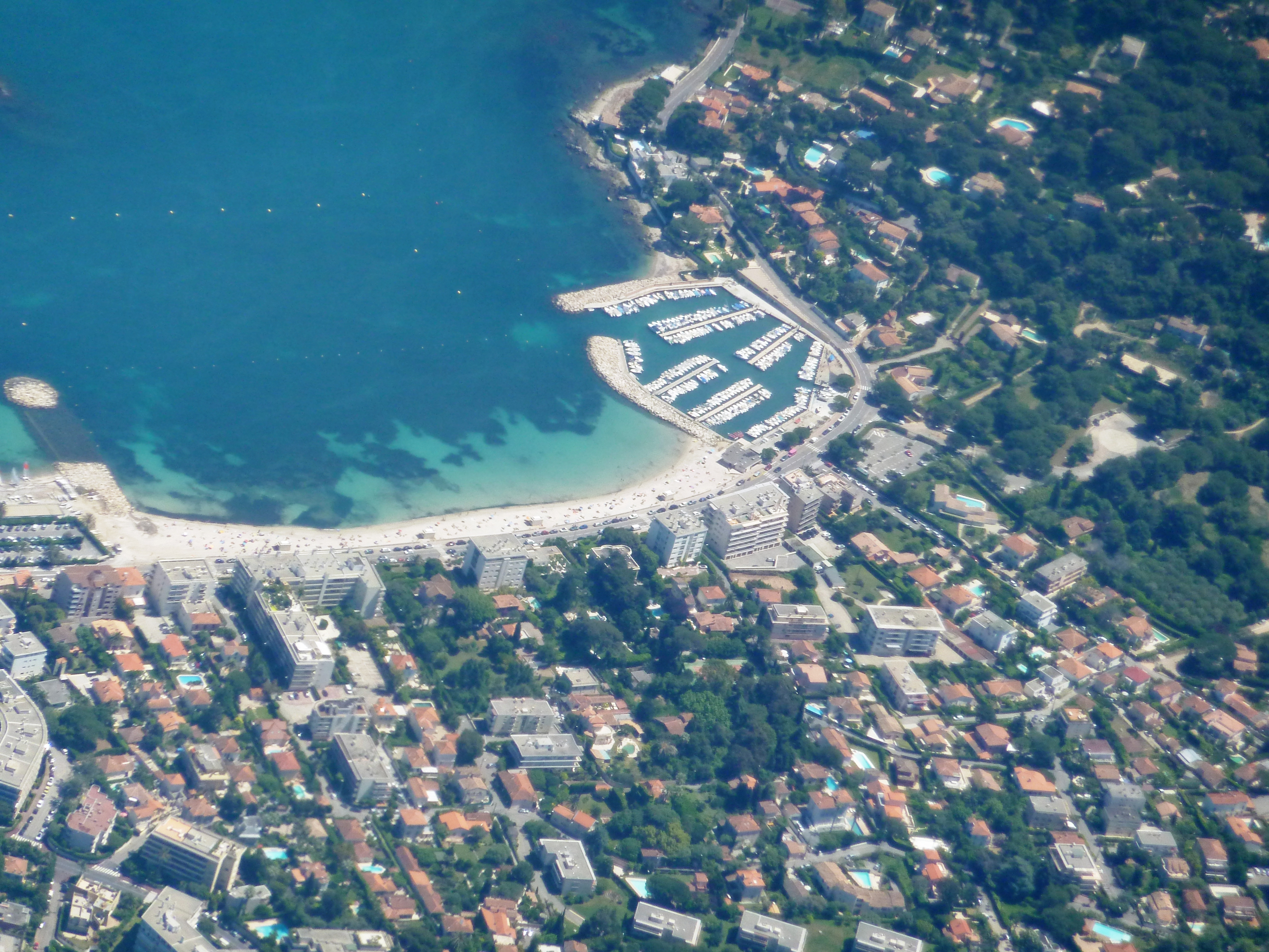 Antibes vue aérienne